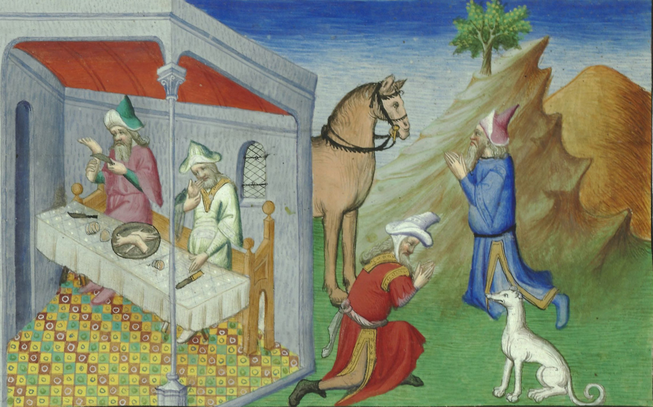 Cannibalism, Le Livre des merveilles de Marco Polo. Paris, Bibliothèque Nationale, Département des manuscrits, Français 2810, folio 74v